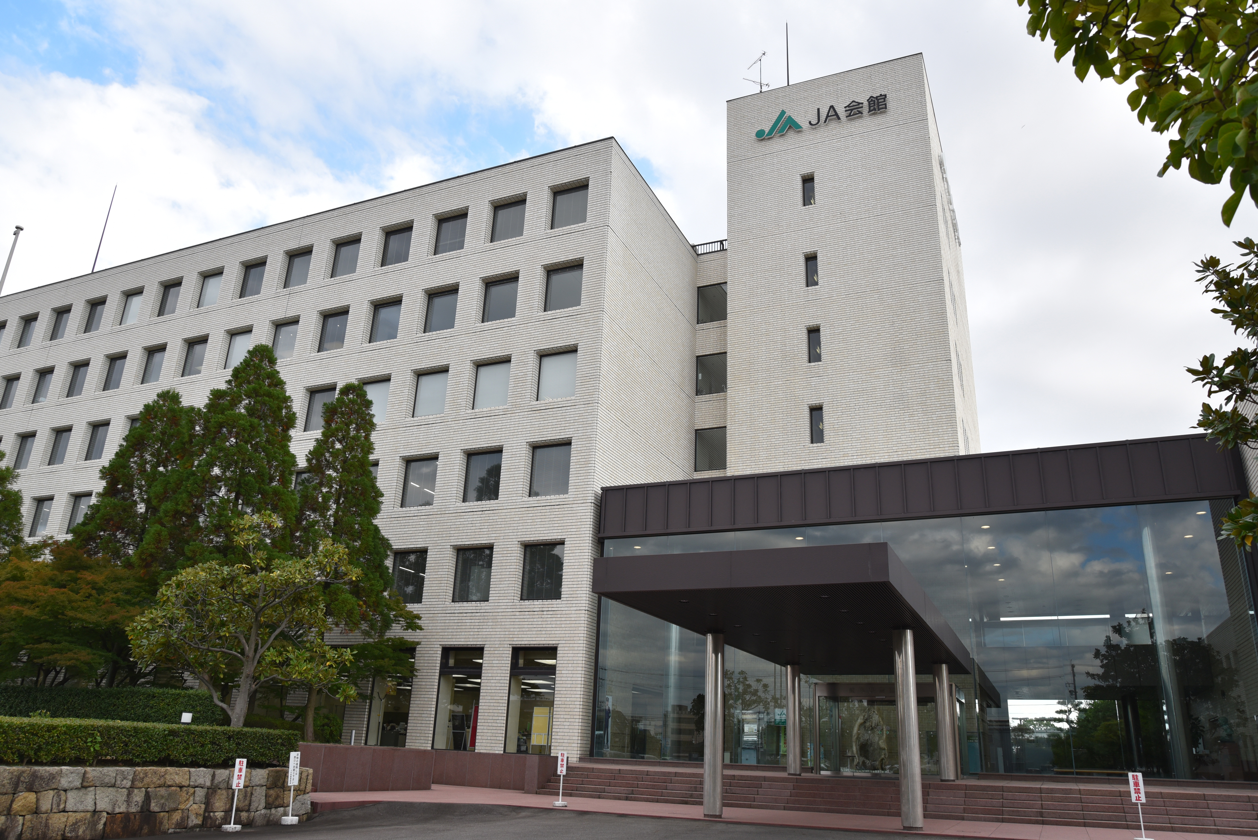 天下富舞をブランド名としてねおスイート拡販をしようとしている全農岐阜の販売課が入っているビル。